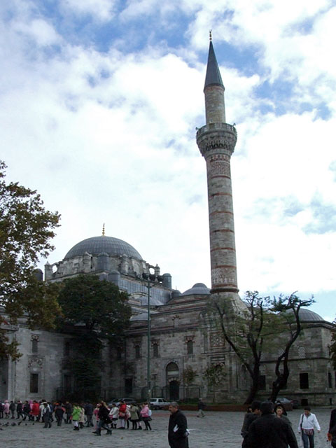 Beyazit Mosque, Istanbul